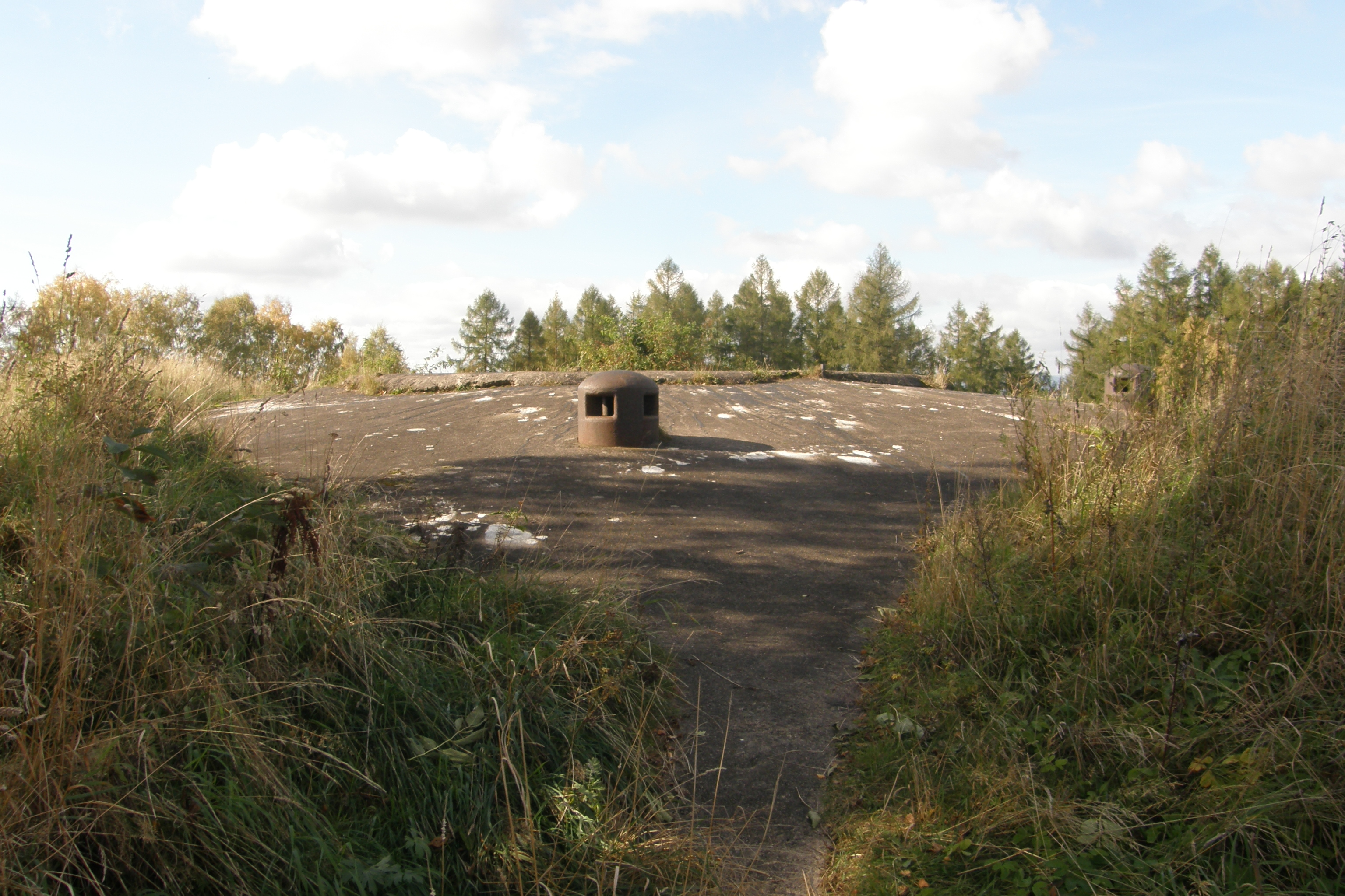 Dělostřelecká výsuvná a otočná věž K-Bg-S 12 Na kótě tvrze Hůrka